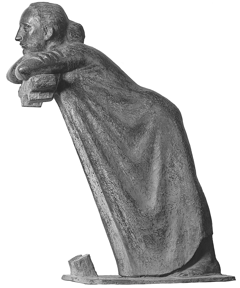 Angelo Frattini's sculpture